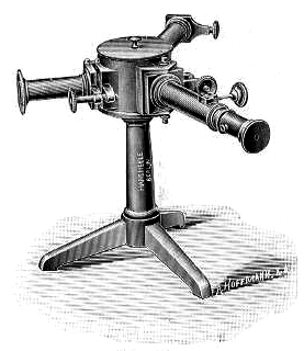 Museum optischer Instrumente